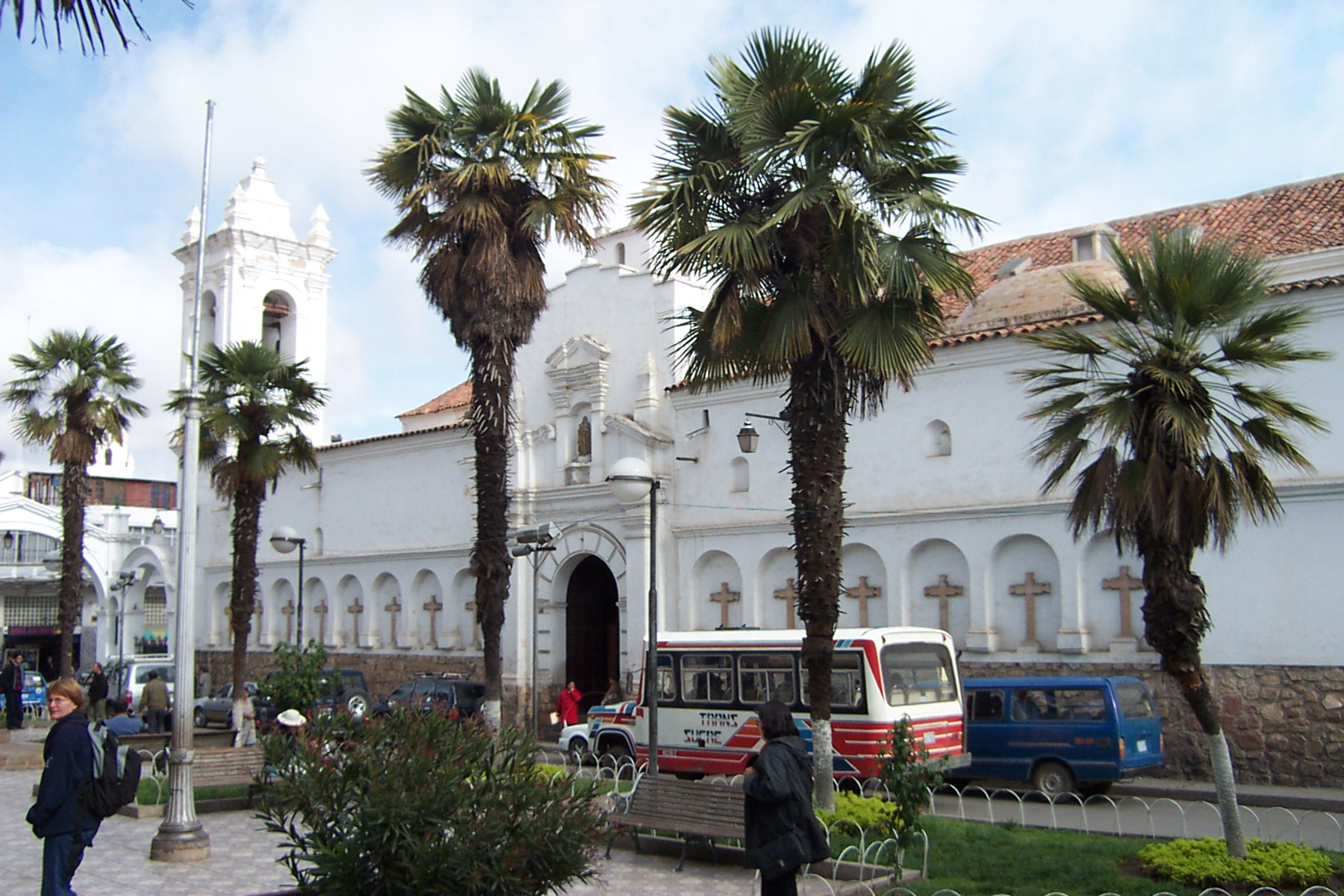 Iglesia San Francisco in Sucre, Bolivia. zomer 2003